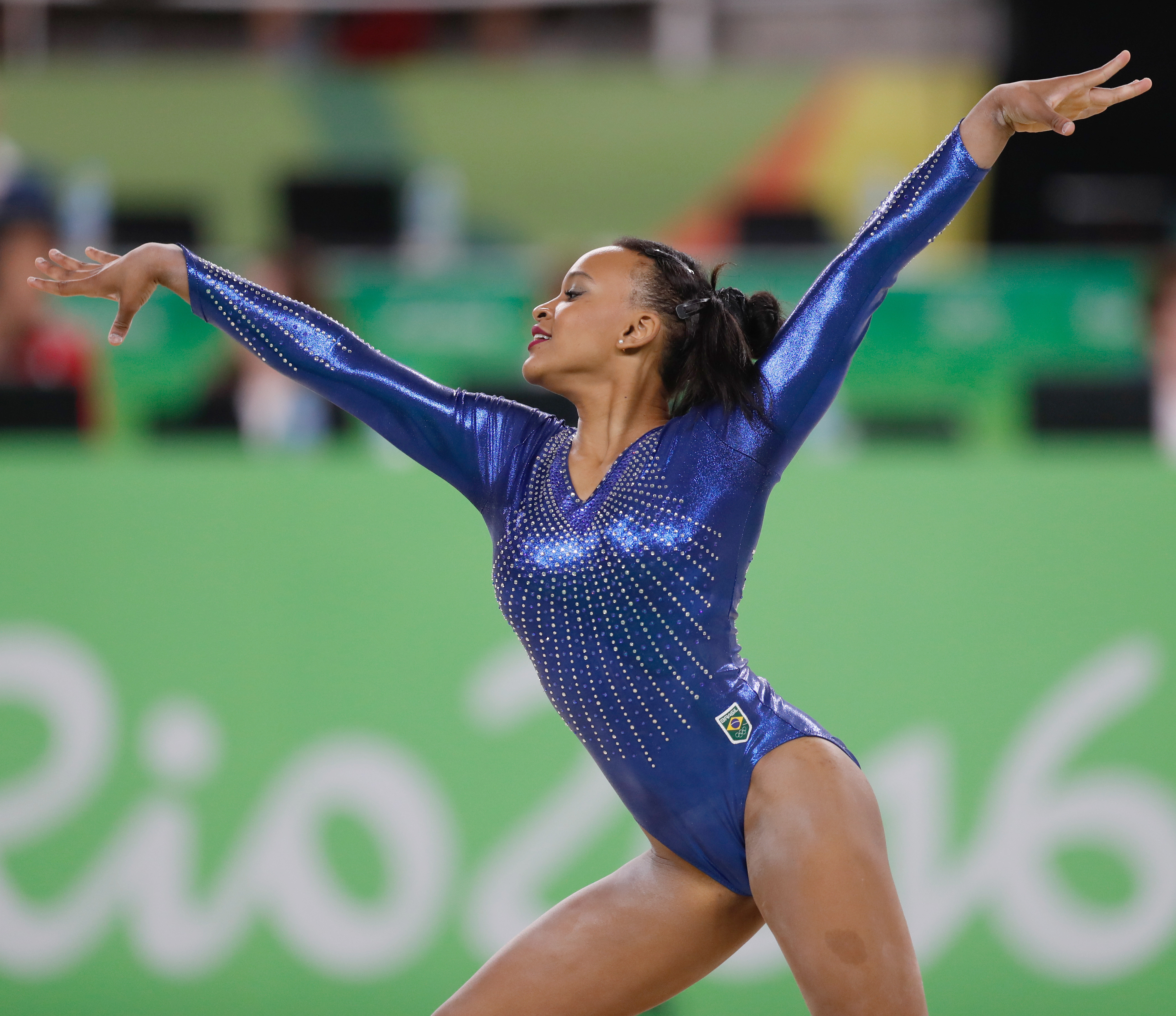 Rio de Janeiro - Rebeca Andrade durante final por equipes da ginástica artística feminina nos Jogos Olímpicos Rio 2016, em que o Brasil terminou em 8º lugar. (Fernando Frazão/Agência Brasil)